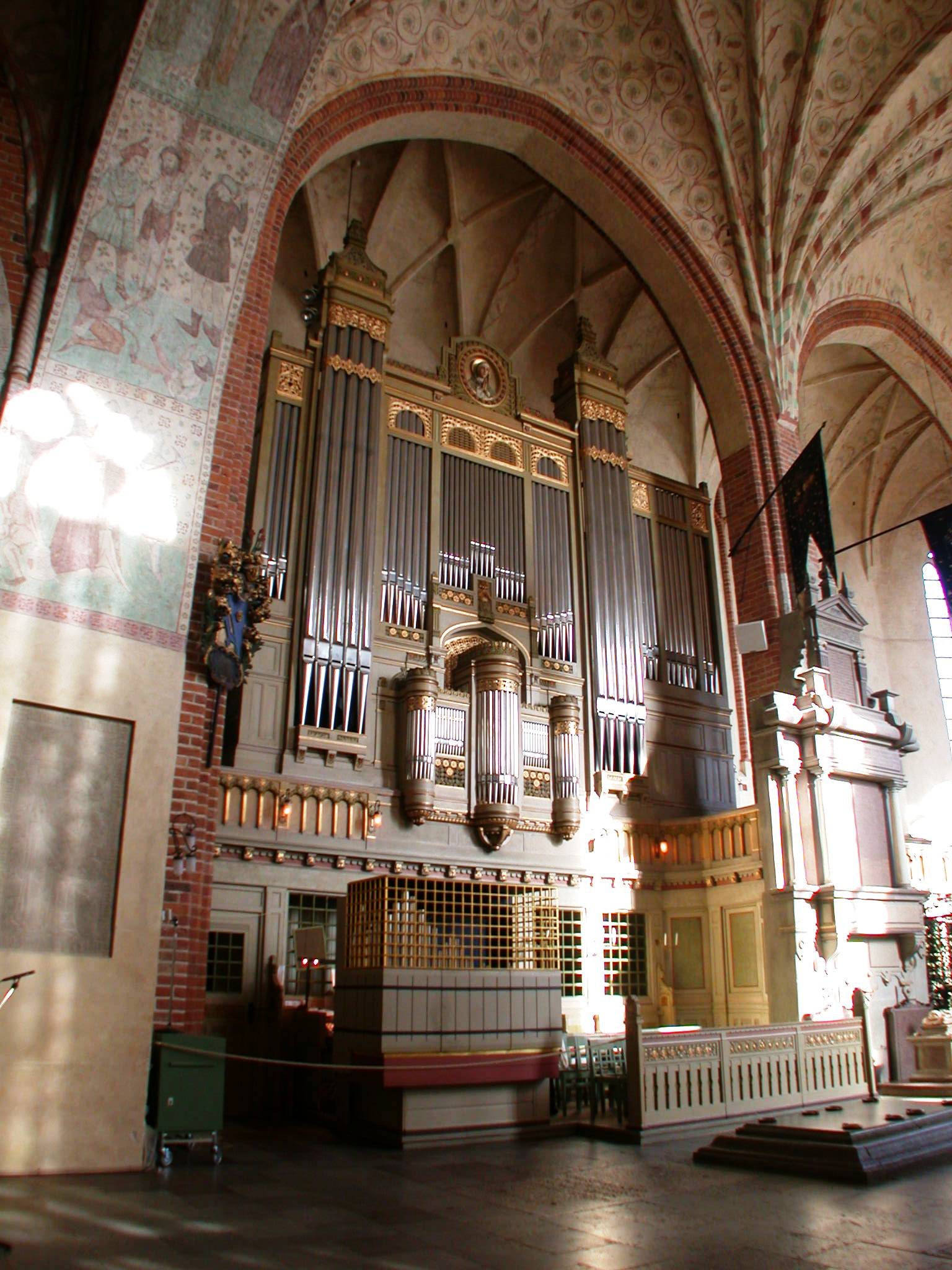 Strängnäs cathedral, Strängnäs, Sweden. Photo by Riggwelter, March 10, 2007.